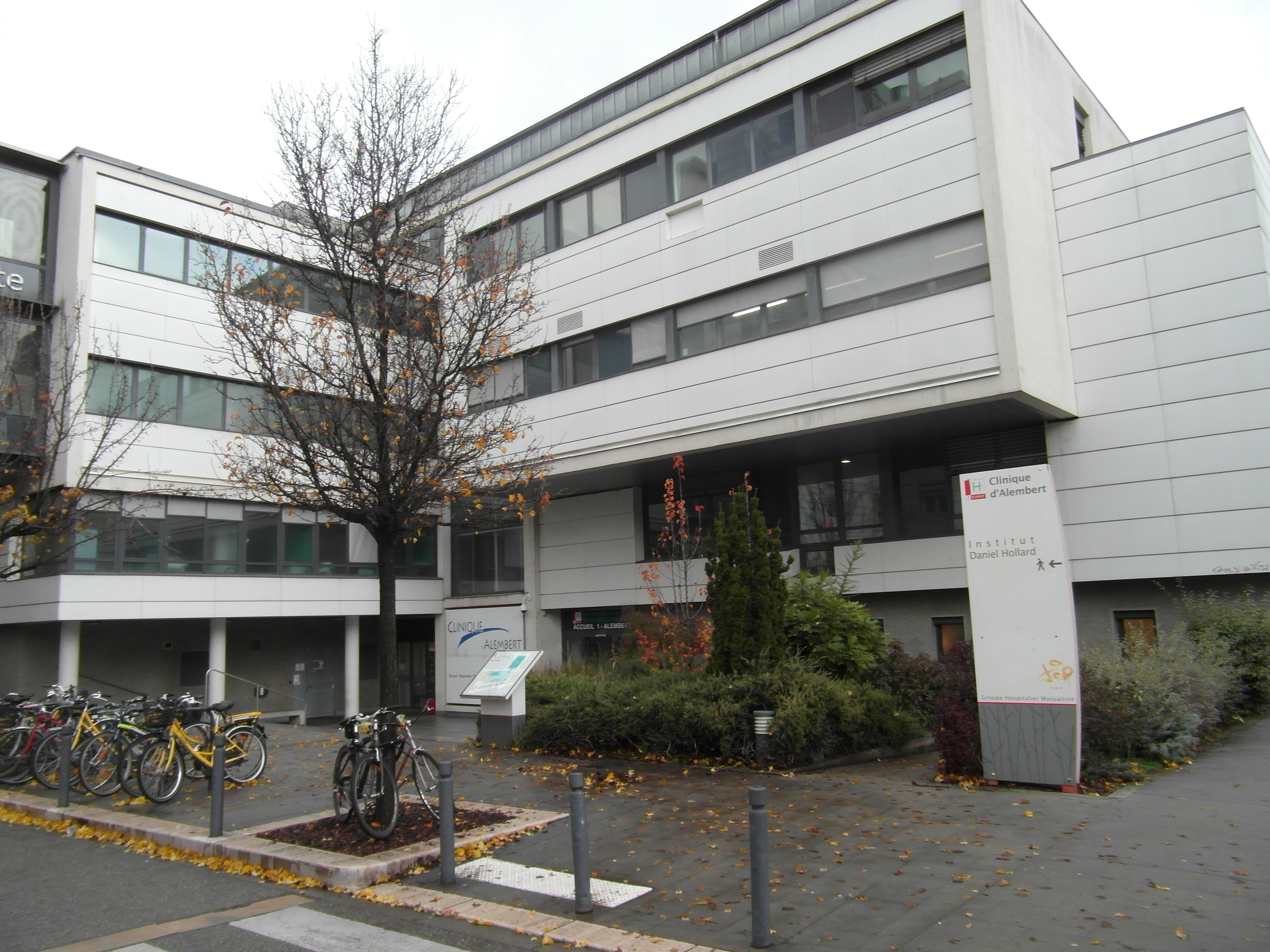 Rue du Dr Hermitte entrée du Groupe hospitalier de Grenoble (site d'Alembert)